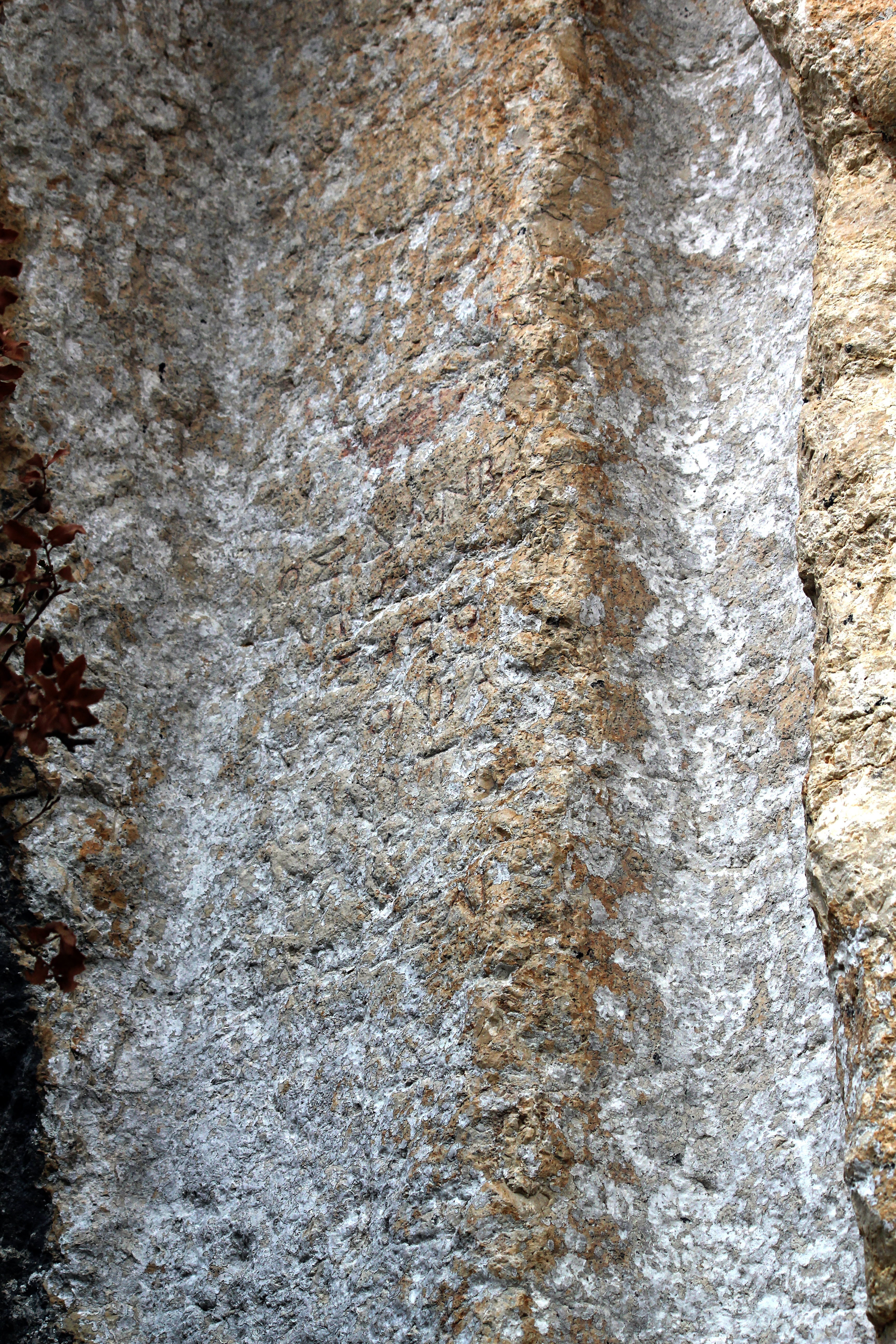 Relief eines Kriegers bei Efrenk, nahe Kızkalesi, Landkreis Erdemli, Südtürkei, Inschrift